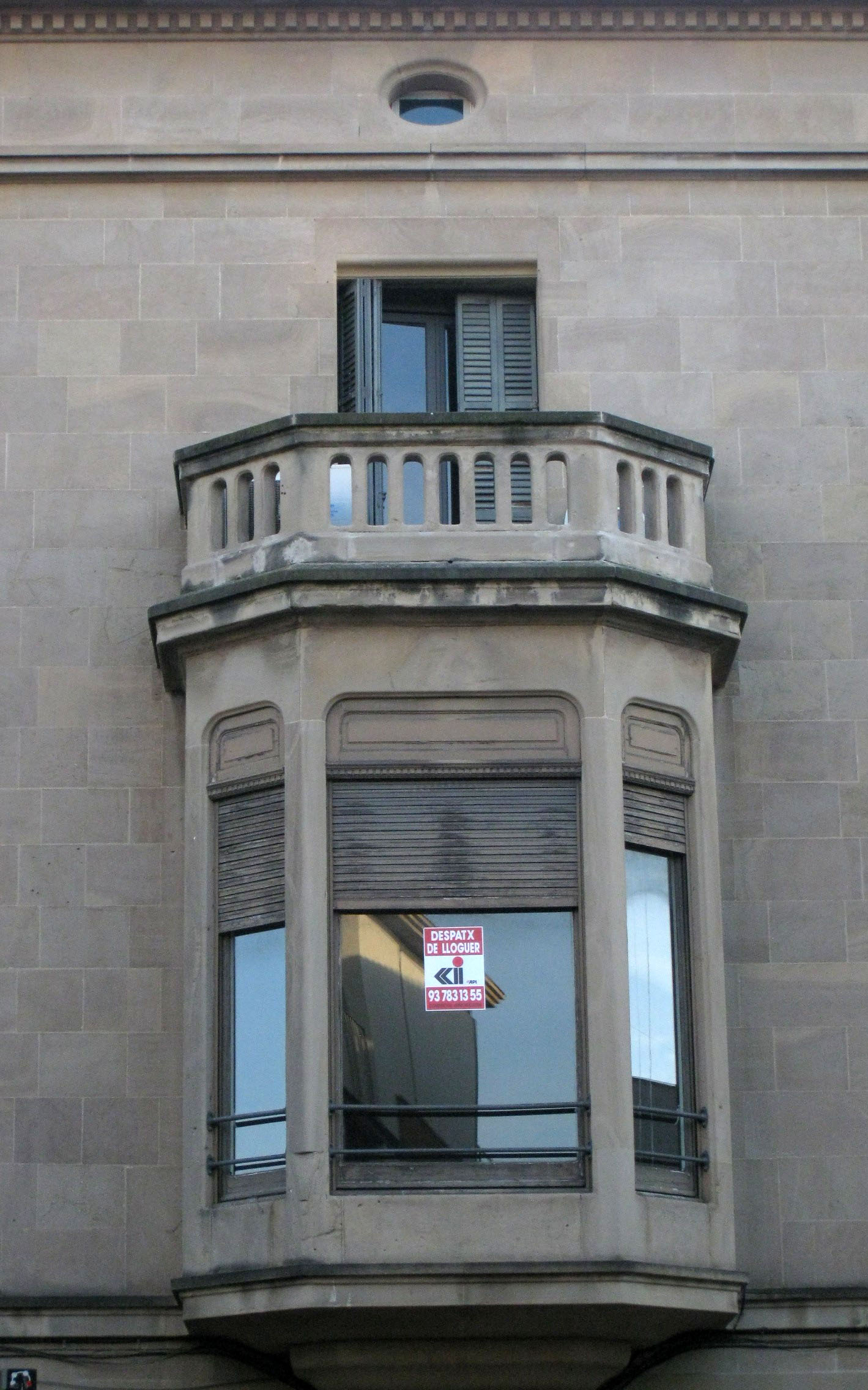 Casa Benet Badrinas, al passeig del Comte d'Ègara núm. 2-4 (Terrassa). Edifici de Lluís Muncunill del 1916. Vista de la tribuna central.